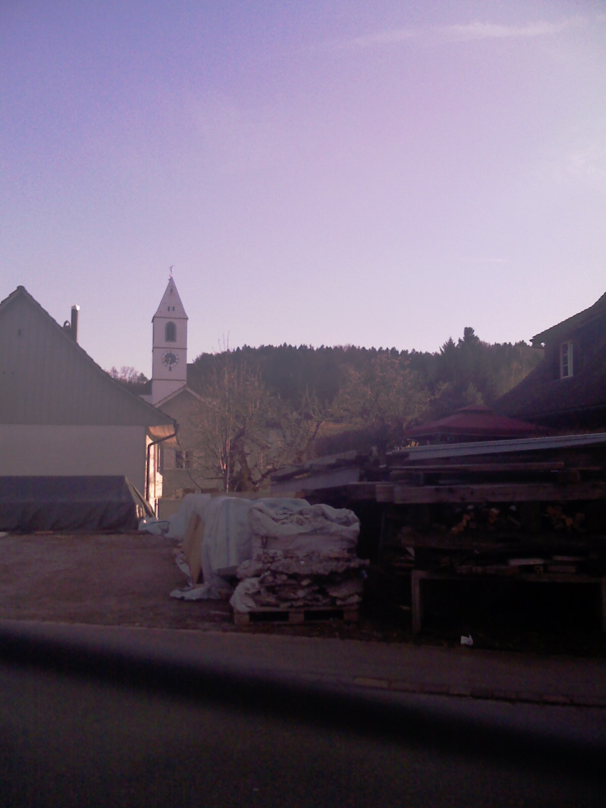 Preĝejo de Gachnang, Kantono Turgovio, Svislando